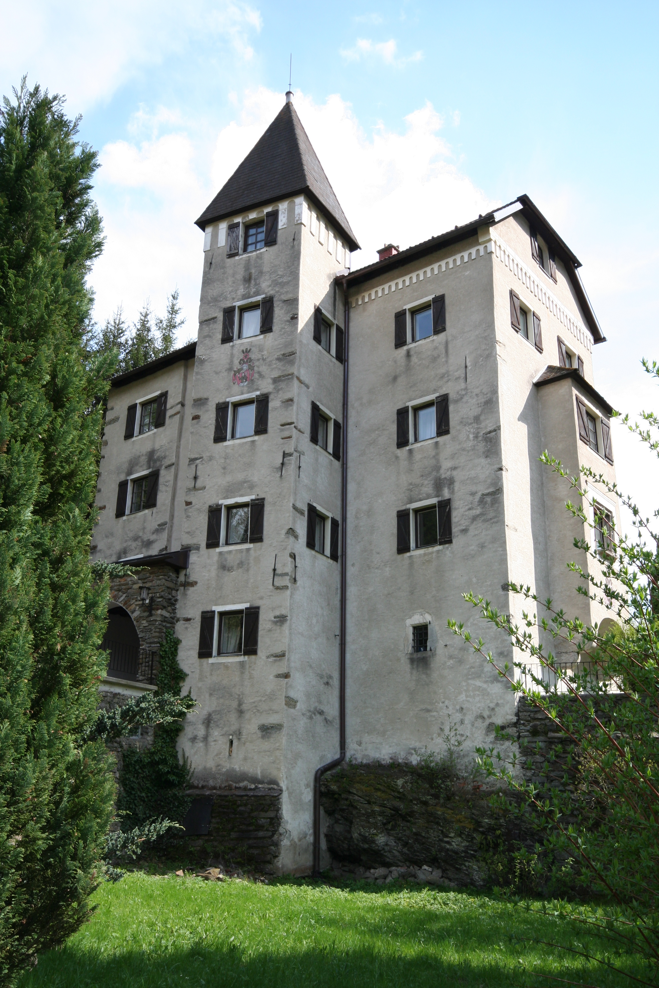 Schloss Süßenstein in Hüttenberg